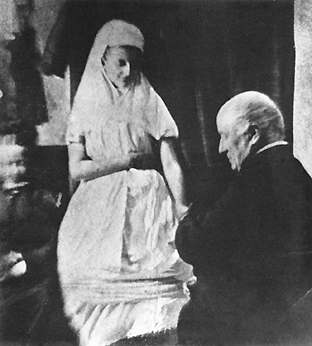 Katie King et le Dr. James M. Gully lui prenant le pouls pris en photo par William Crookes pour ses «Notes of an Enquiry into the Phenomena called Spiritual during the Years 1870-1873.», Quarterly Journal of Science., janvier 1874.